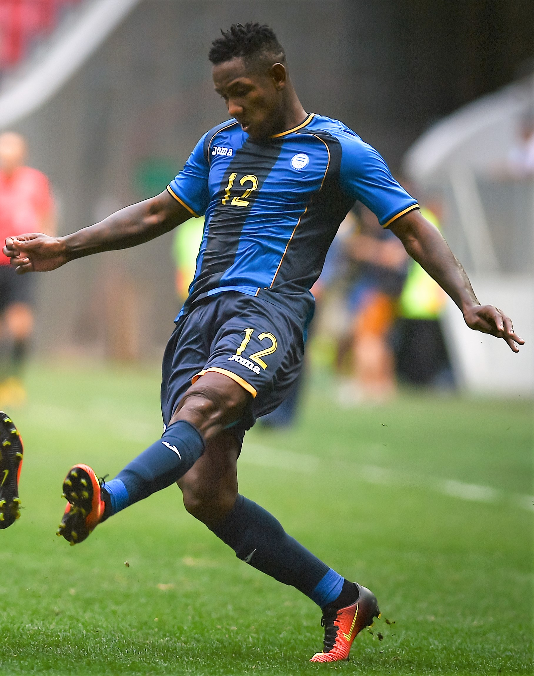 Estádio Nacional de Brasília Mané Garrincha, Brasília, DF, Brasil, 10/8/2016. Argentina e Honduras jogam nesta quarta-feira (10), no Estádio Mané Garrincha, pelo grupo D do futebol masculino nas Olimpíadas 2016.